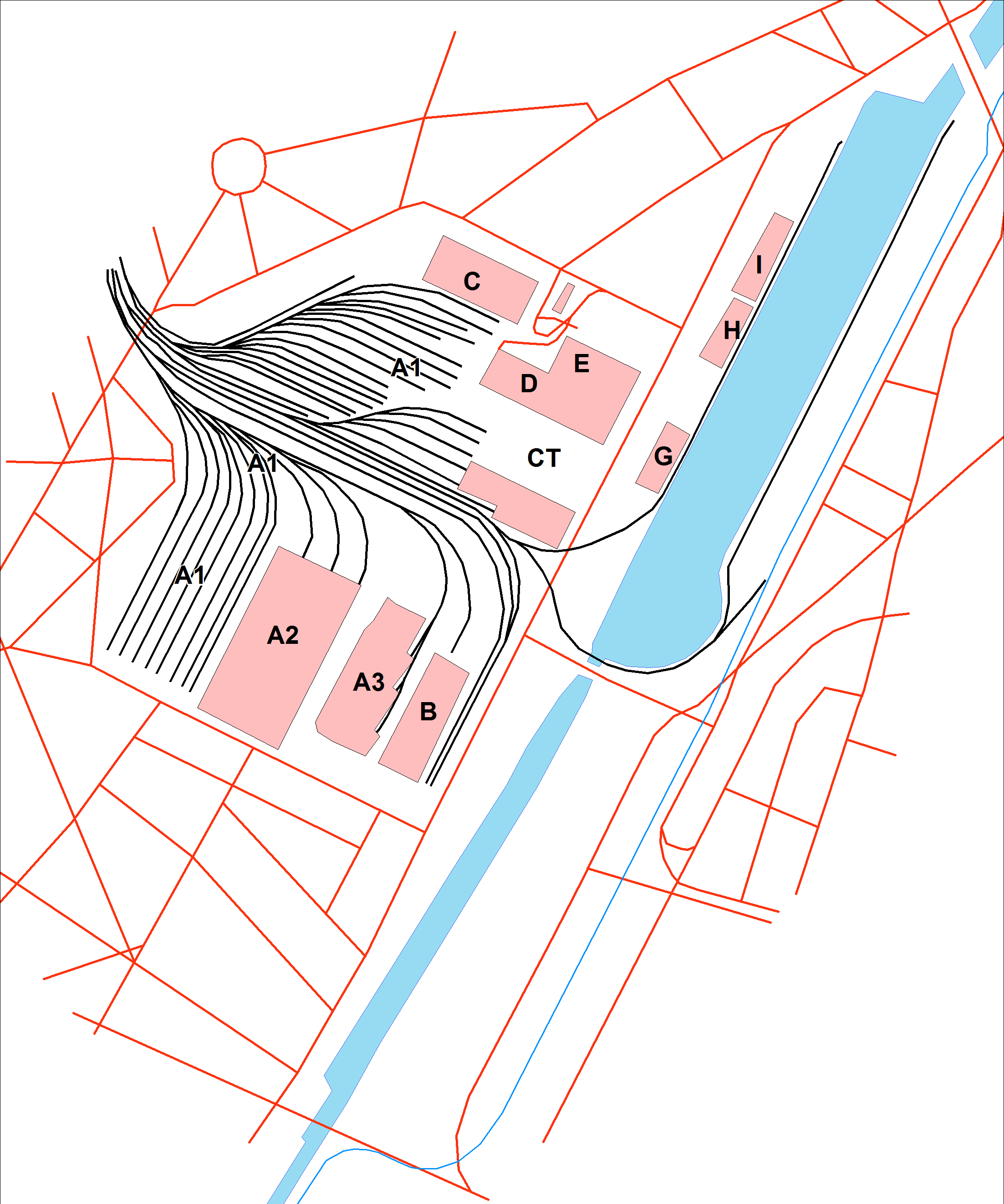 Schets van site Thurn en Taxis tijdens de uitbating als goederenstation en opslagplaats